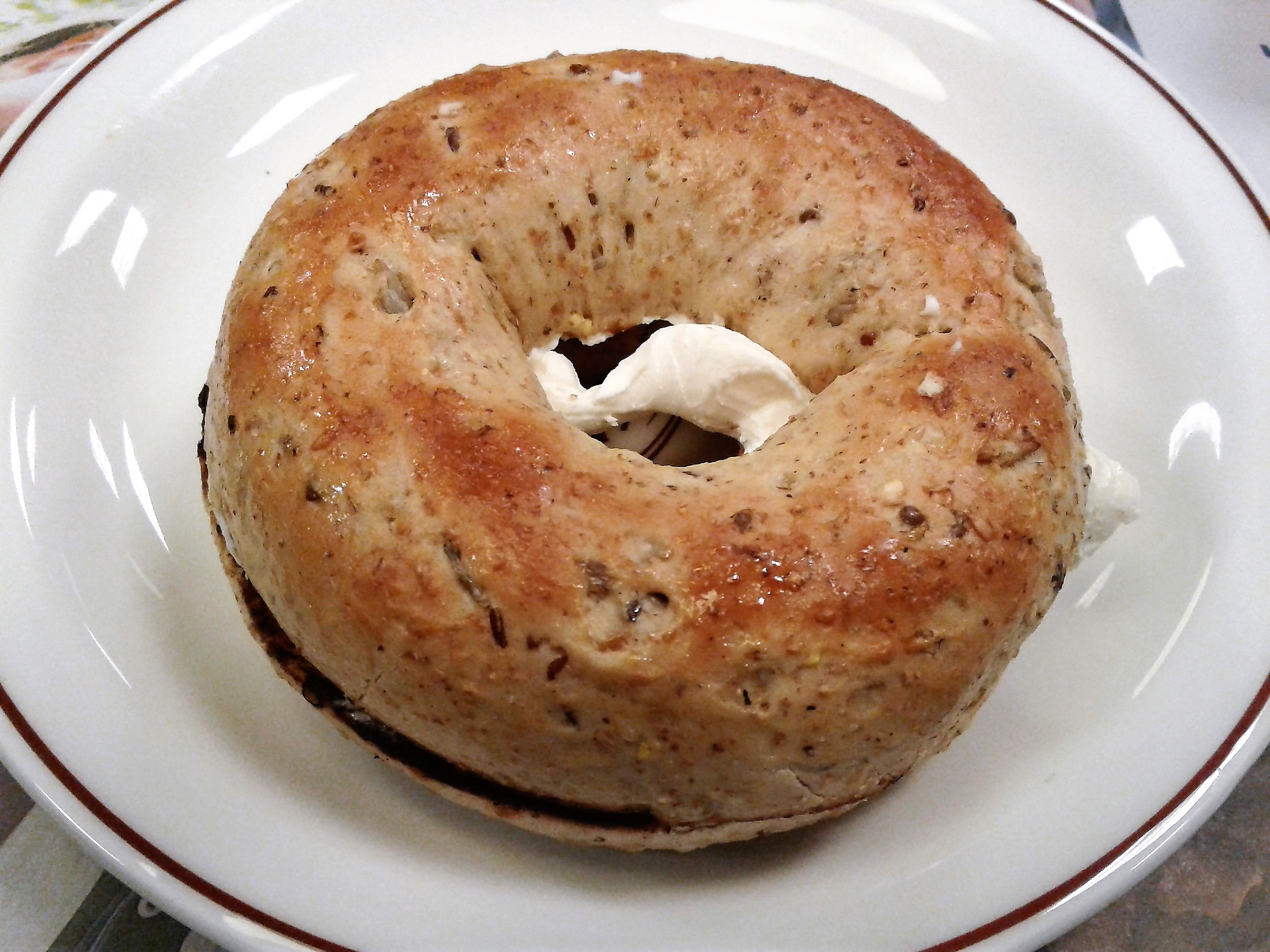 Bagel 12 grains fromage à la crème